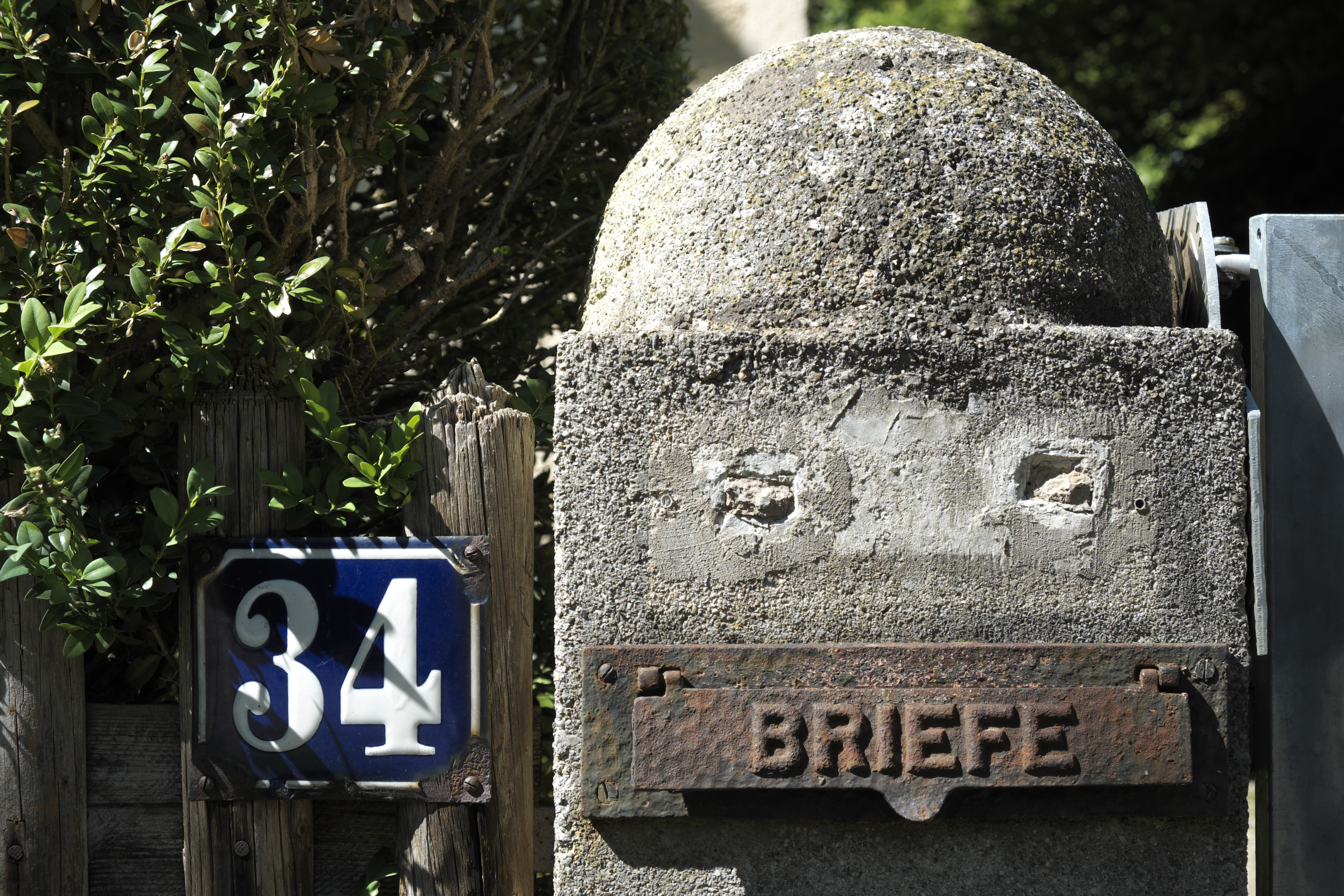 Villa in der Hofmillerstraße 34 in Obermenzing im Stadtbezirk Pasing-Obermenzing in München (Bayern/Deutschland), Hausnummer und Briefkasten